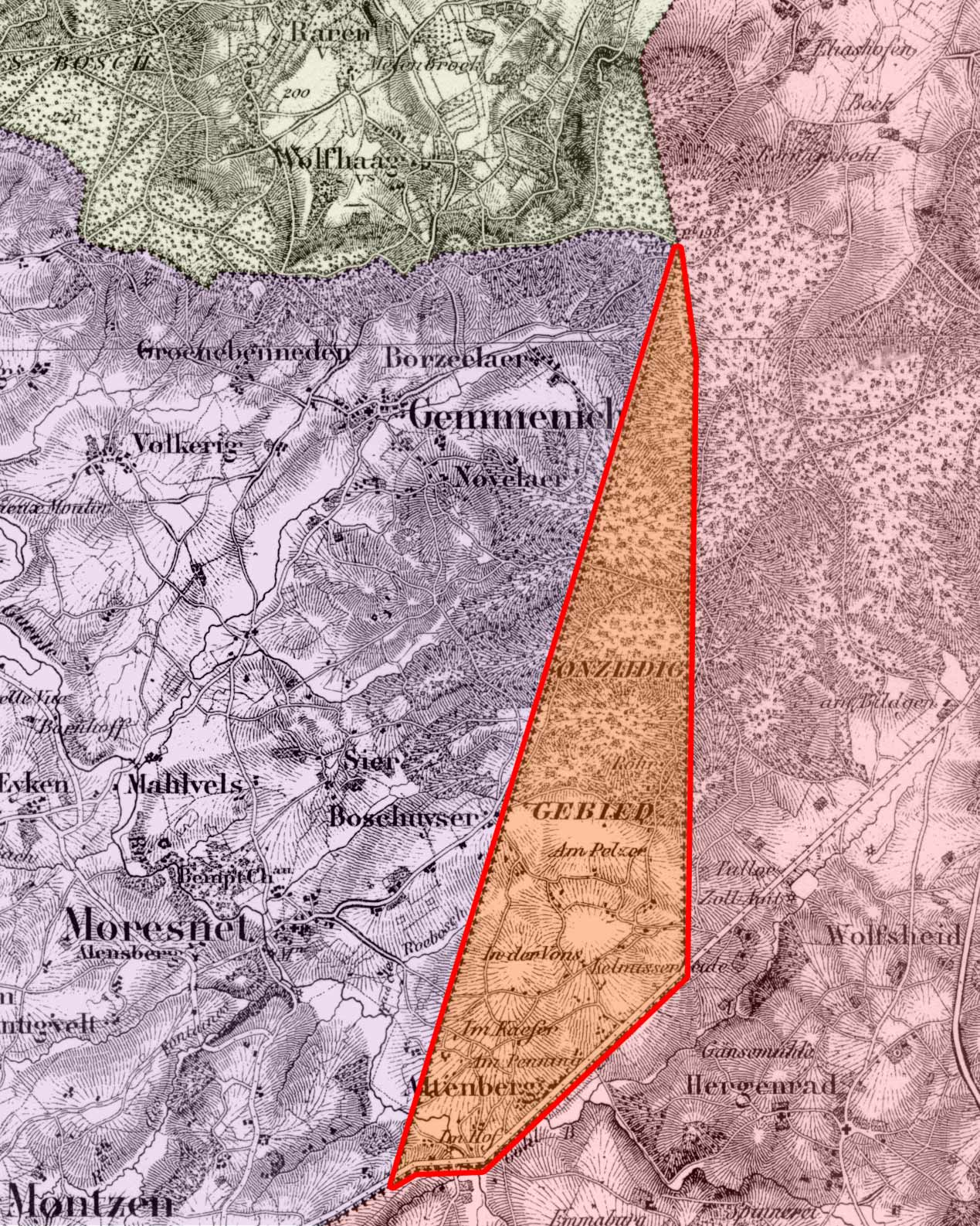 Vierlandenpunt. TMK schaal 1:50.000, blad62, Ministerie van Oorlog , verkend 1842, uitgegeven 1862. Digitale bewerking Ed Stevenhagen 2005.